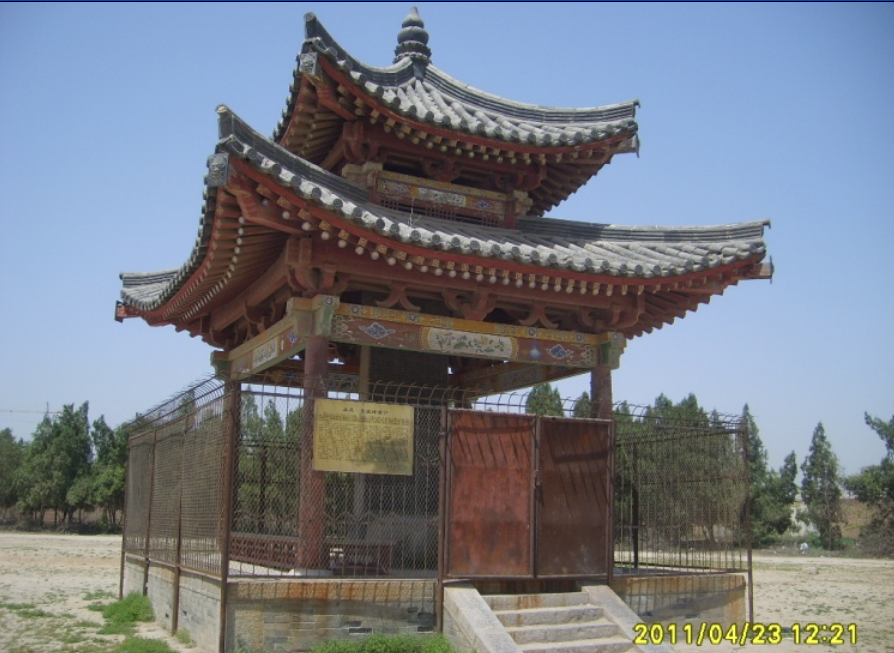 位于高陵县南一学校的操场内，高陵塔西北侧